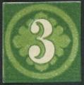 Bayerisches Laubblatt-Essay